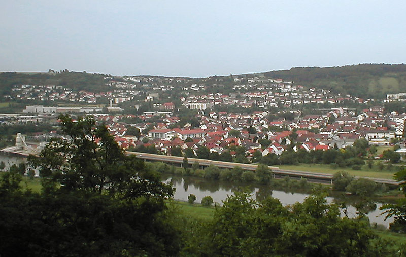 Mosbach-Diedesheim, von Schloss Neuburg über Obrigheim vom anderen Neckarufer aus gesehen